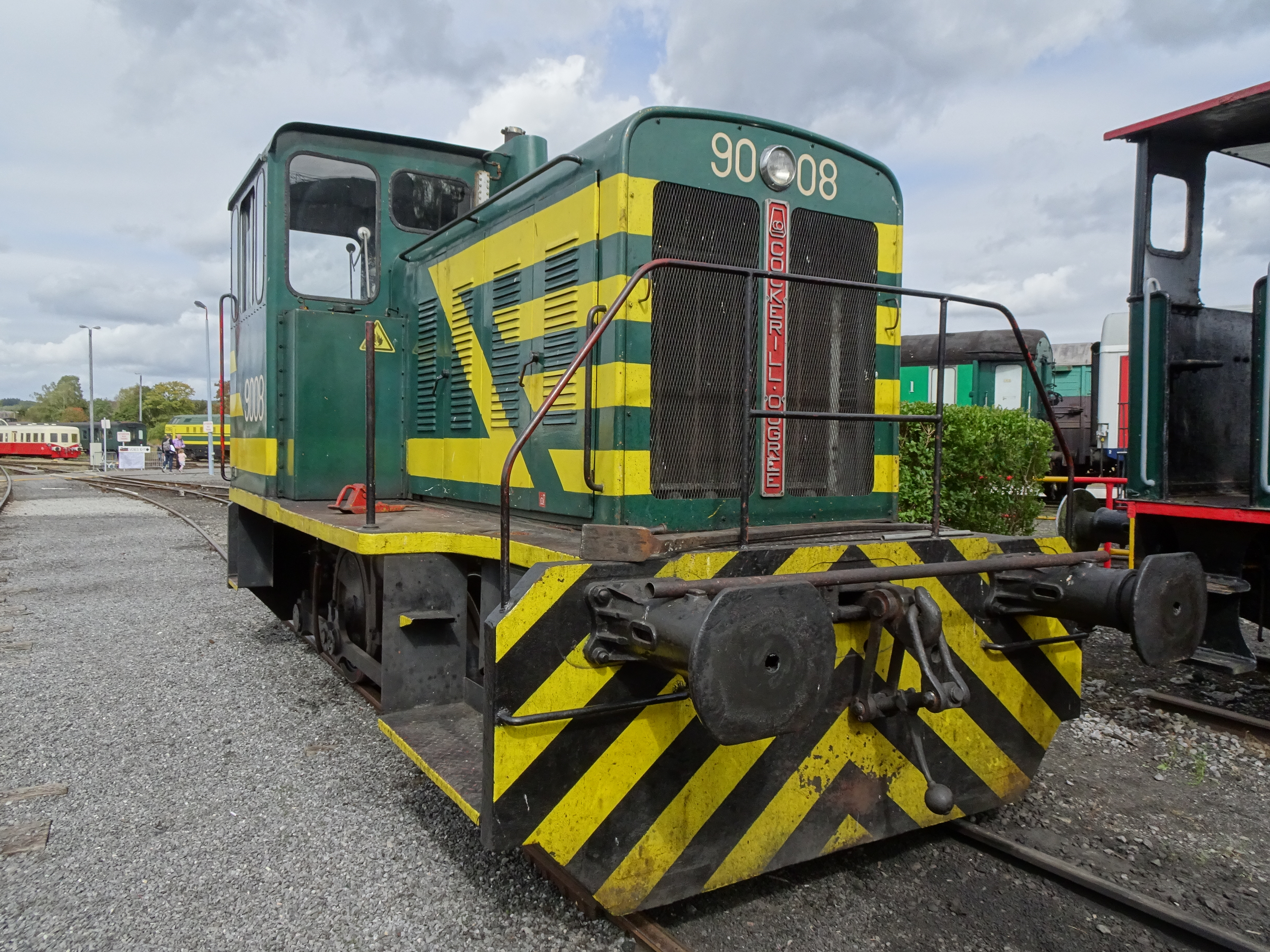 Le locotracteur 9008 au festival vapeur du CFV3V